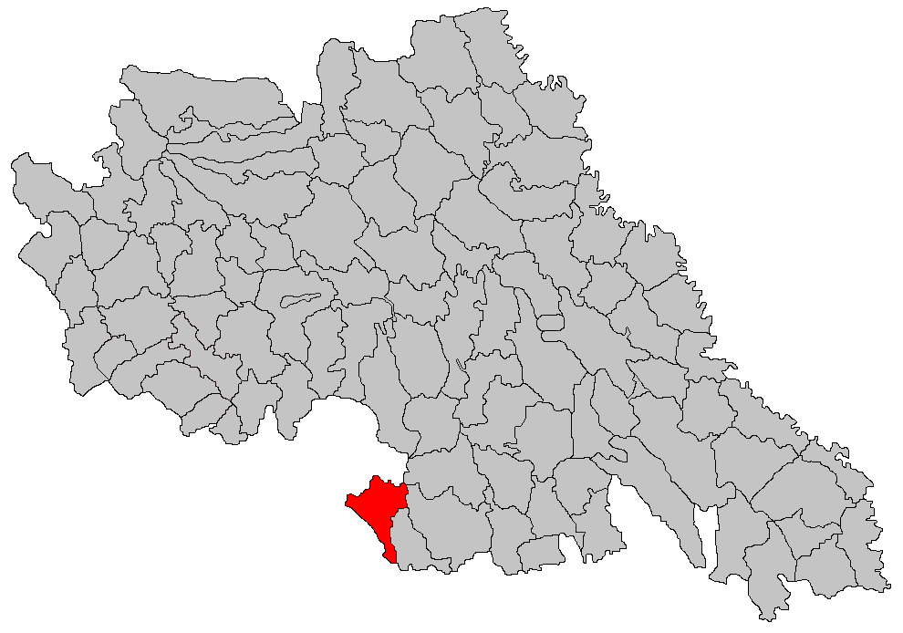 Categorie:Hărţi ale judeţului Iaşi